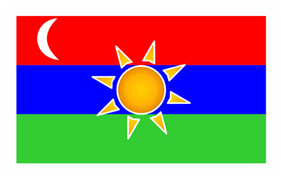 Bandera del Distrito de Colán